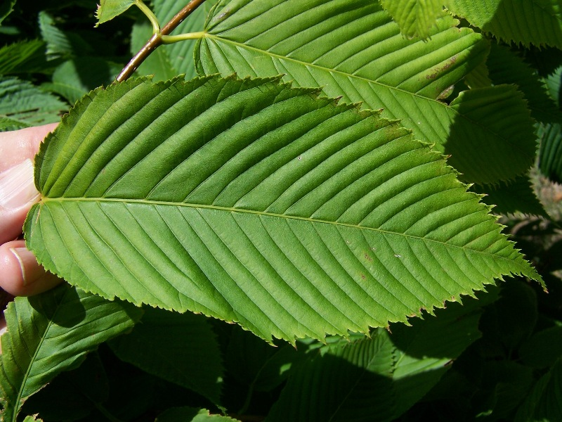 Acer carpinifolium leaf, Morton Arboretum acc. 6-61-4